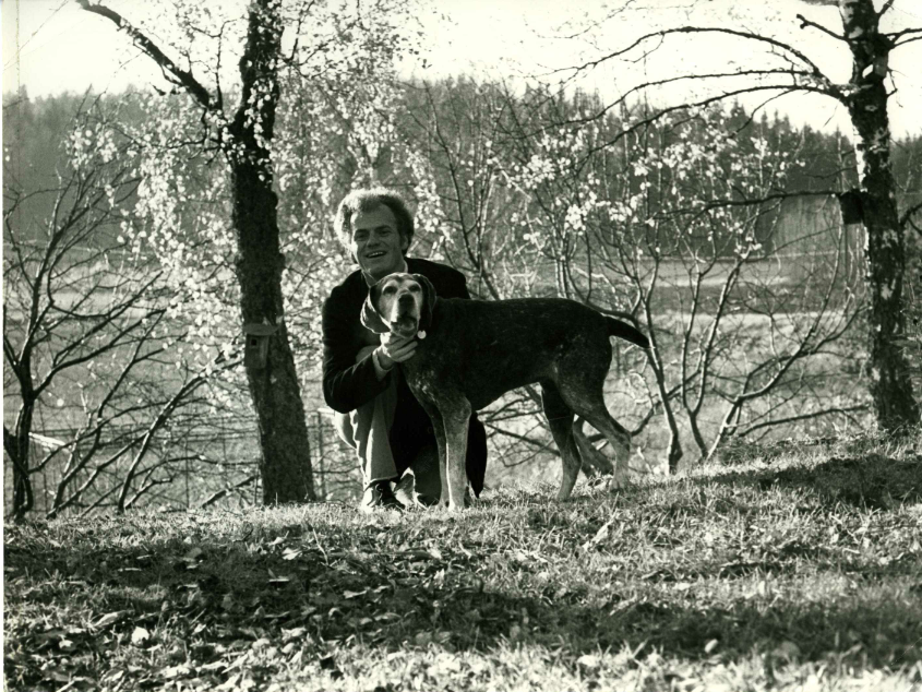 Anders Hallgren under en paus på ett redaktionsmöte rörande hundtidningen "Vi hundägare". Platsen är ute vid Ingrid Lingmarks hus i Solsta (Vallentuna), Stockholm en höstdag 1977. Hunden på bilden är Tellus Kamilla född 1965. Fotograf: Uno Lingmark